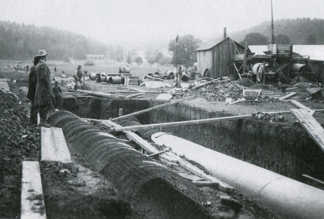 Vattenledning mellan Bornsjön och Norsborgs vattenverk under byggnad